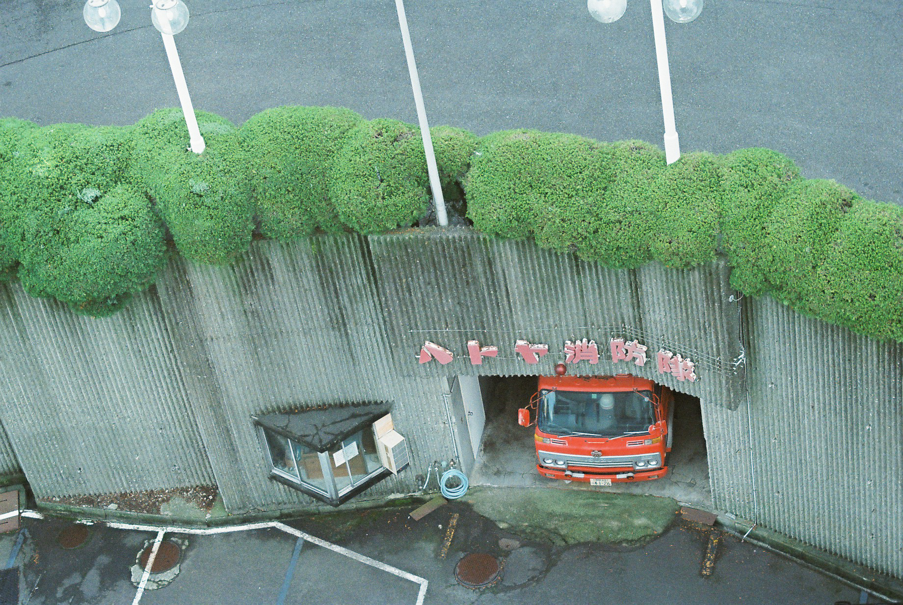 ハトヤ ホテルの安全はお任せ！ ハトヤ自衛消防隊の秘密